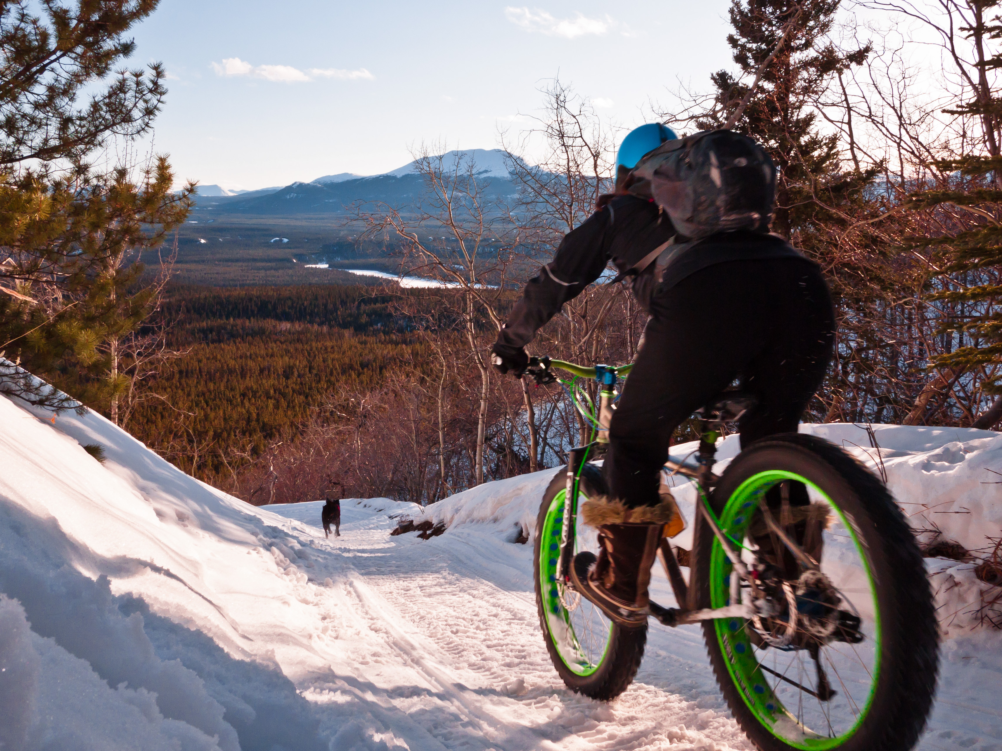 Cantlie Lake Ride